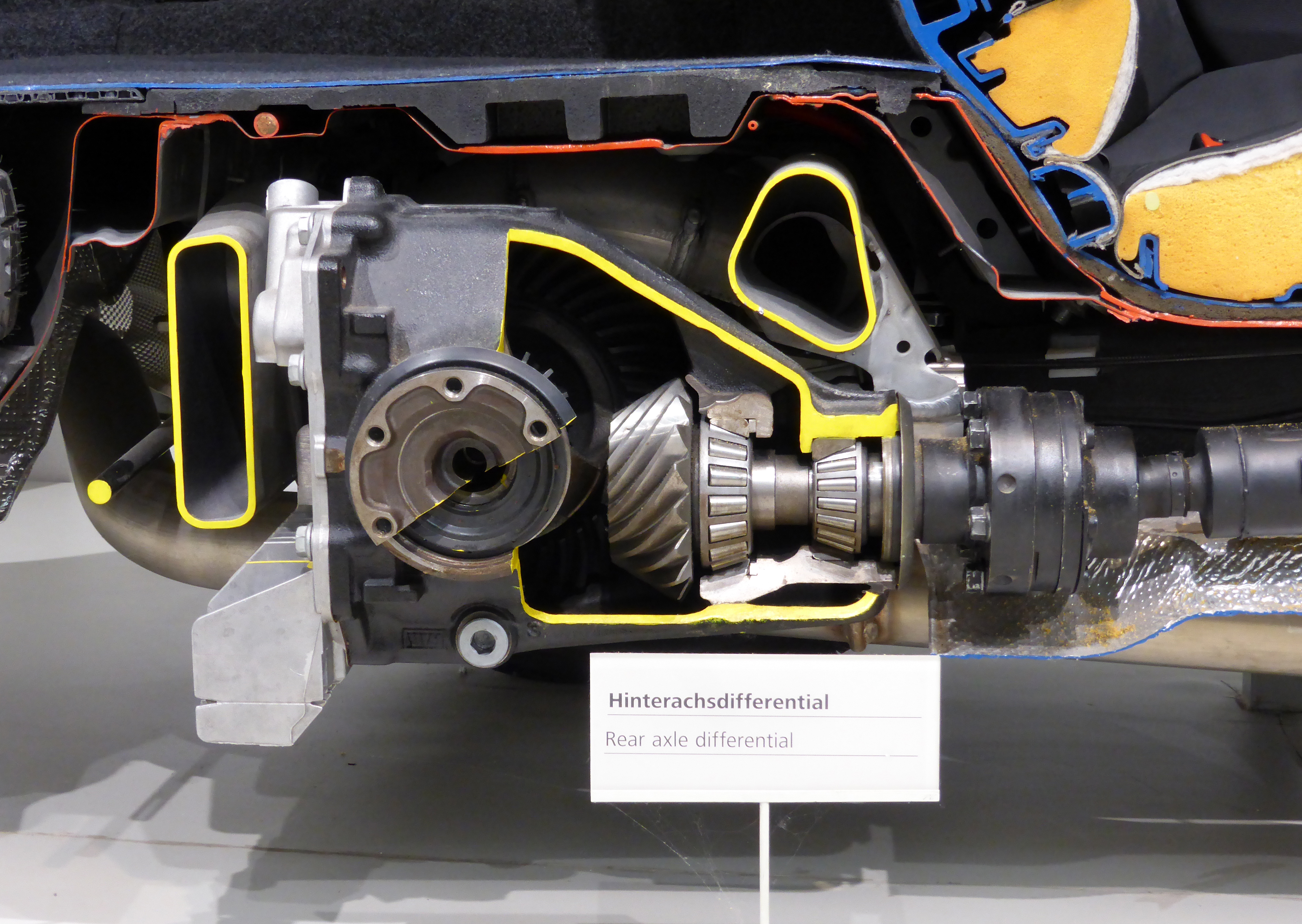 Schnittmodell eines BMW 530d, Baujahr 2009 (BMW E60). Ausgestellt im Deutschen Technikmuseum Berlin. Wikipedianische KulTour am 10. Oktober 2015 in der Ausstellung des Museums.